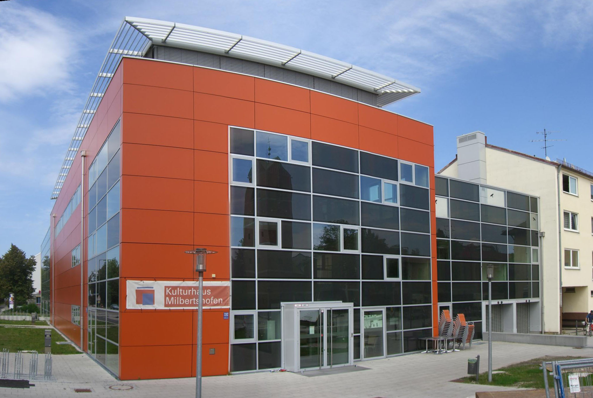 Kulturhaus Milbertshofen, München, von Reichert, Pranschke + Maluche